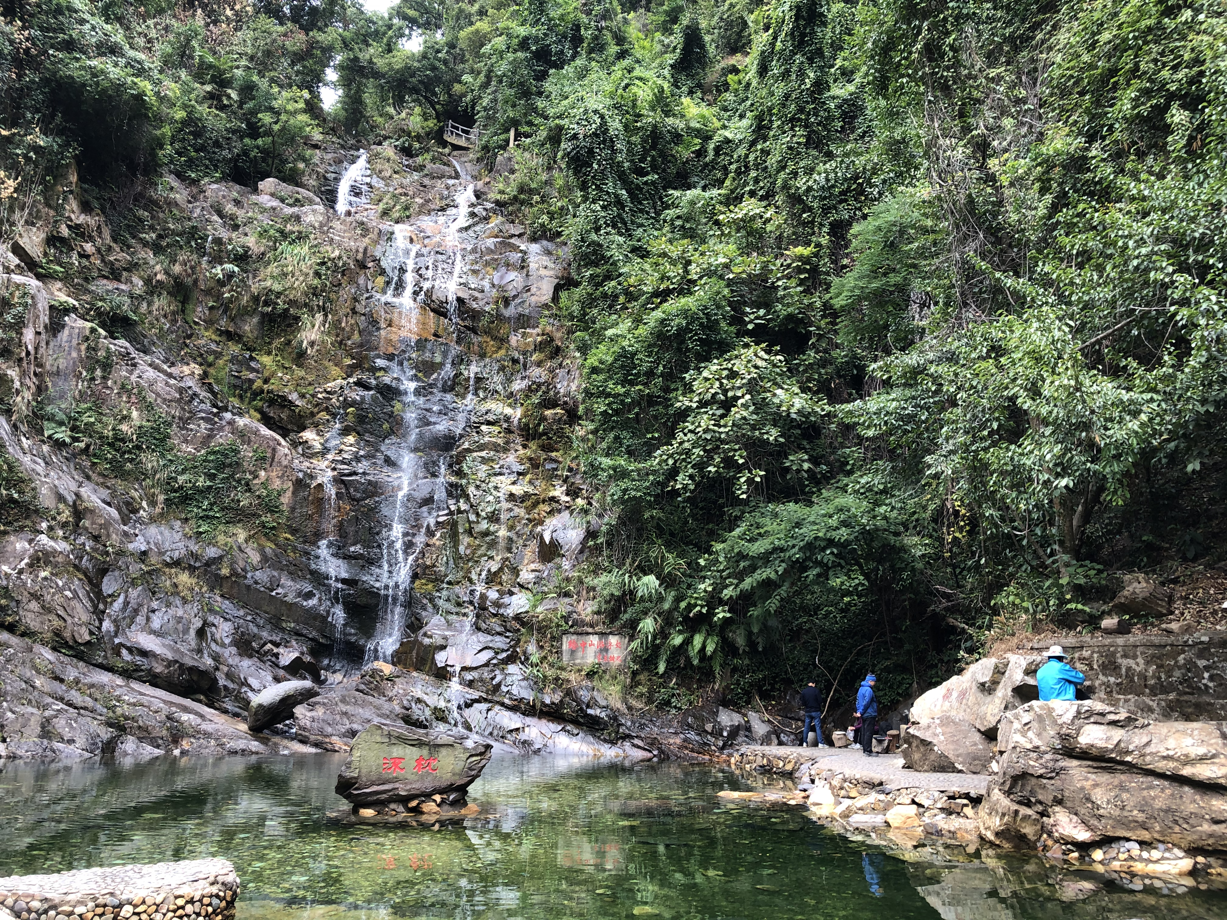 肇庆鼎湖山飞水潭-2020年1月